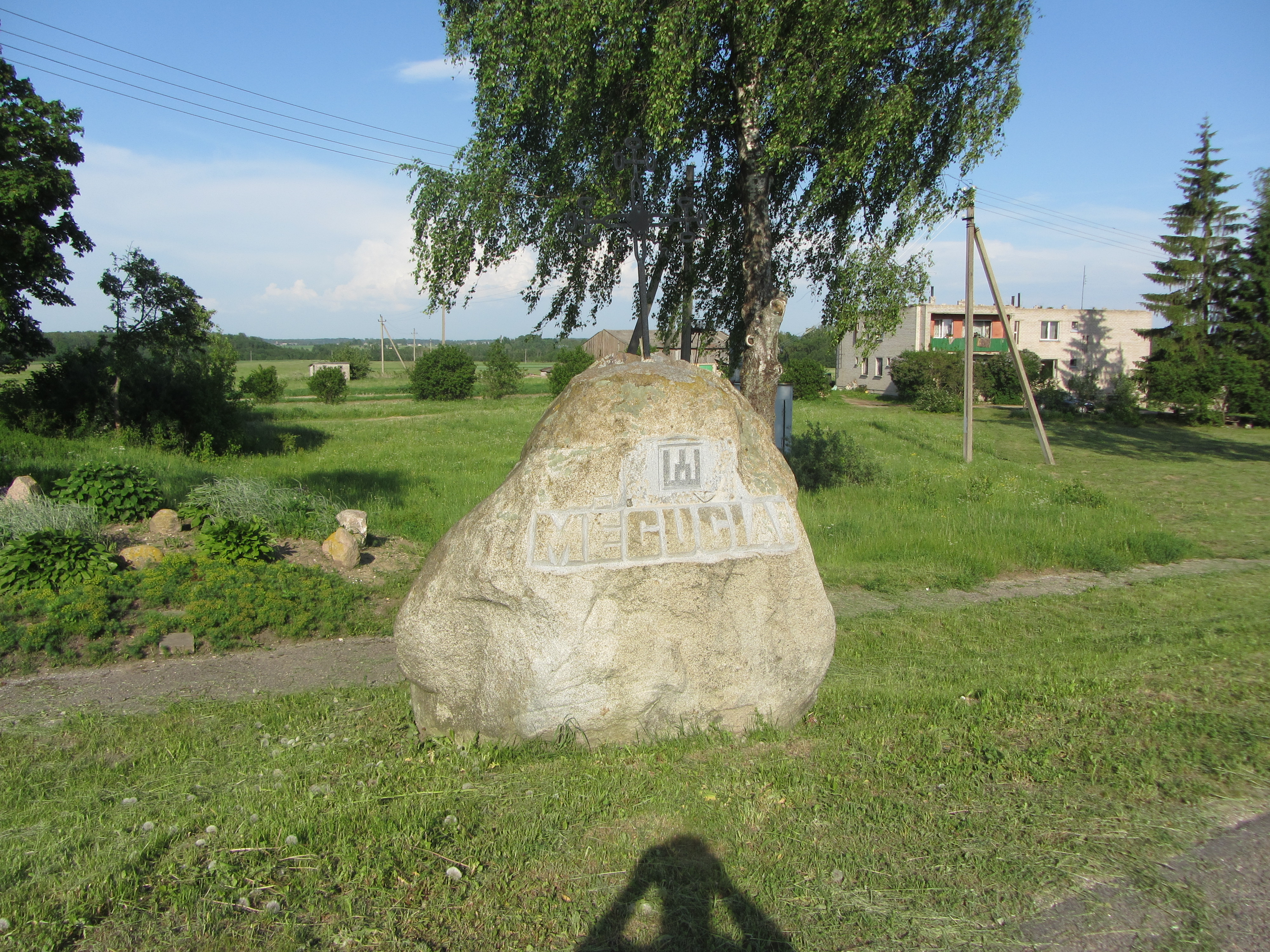 Mėgučiai, Lithuania